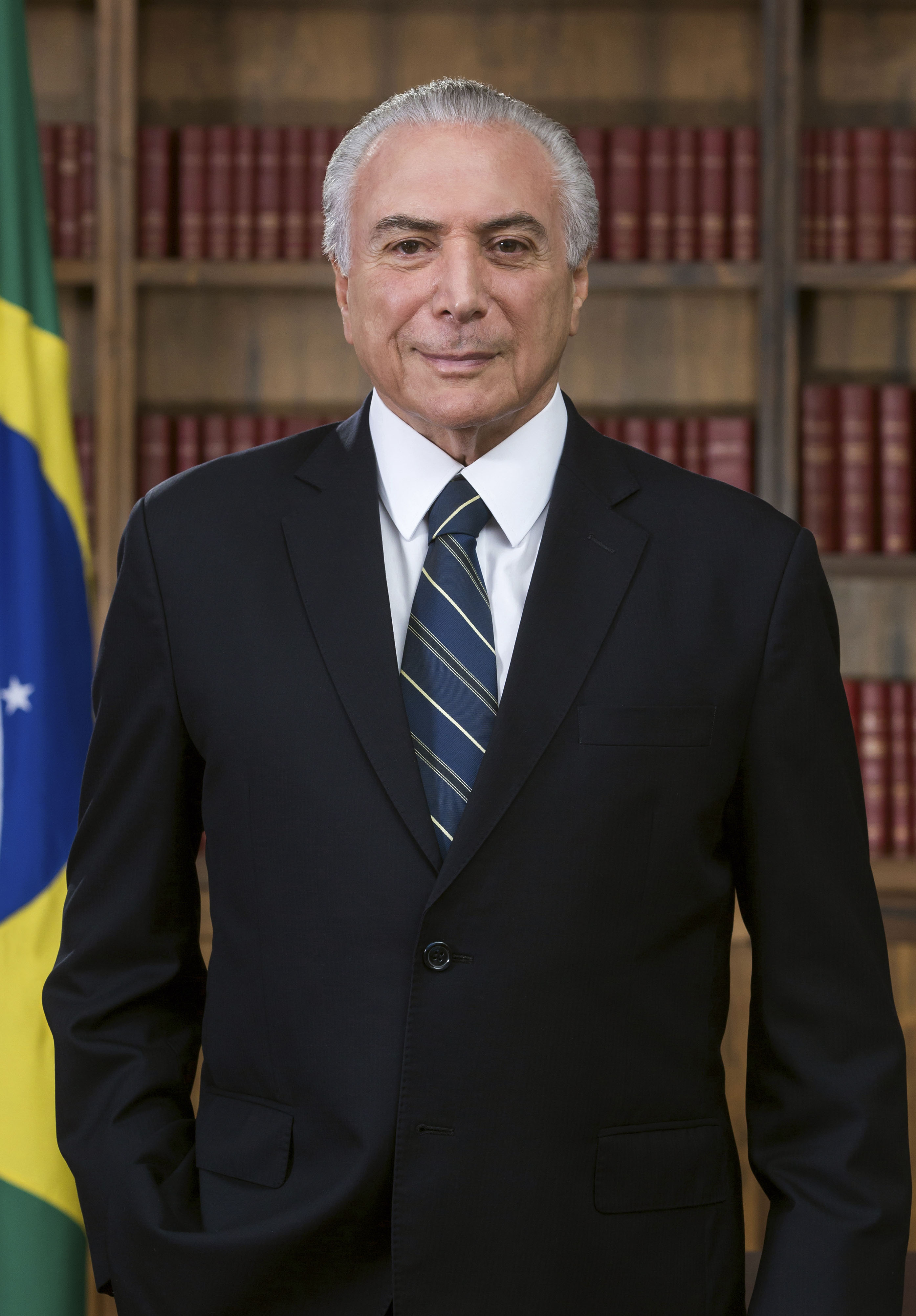 Foto oficial do Presidente Michel Temer, cortada pegando apenas a parte mais central da foto.